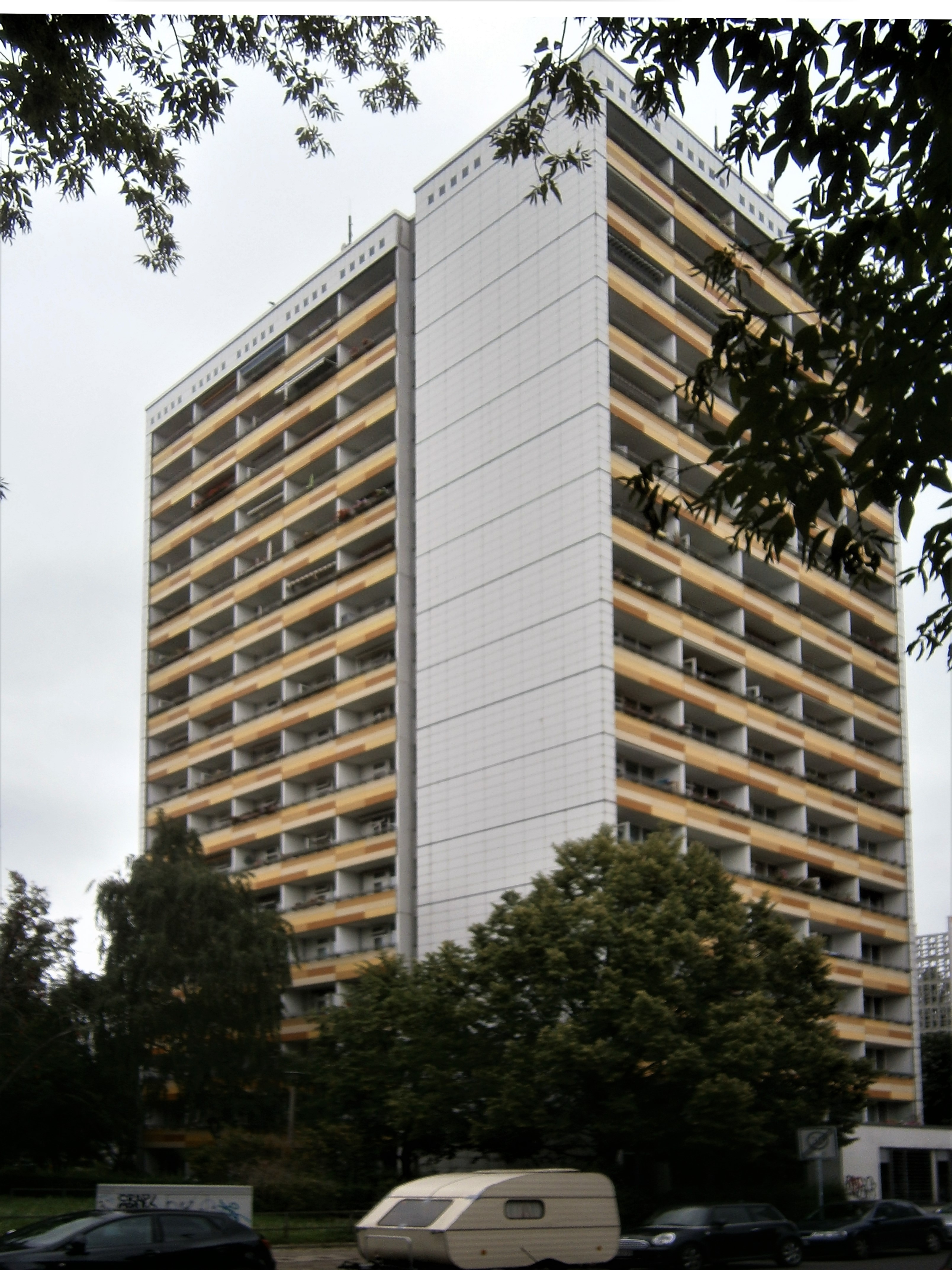 Die Andreasstraße ist eine Straße im Berliner Bezirk Friedrichshain-Kreuzberg, Ortsteil Friedrichshain. Angelegt wurde sie 1862 auf vorherigen Gartenland und 1863 benannt. Bis um 1900 waren die Grundstücke bebaut und bis 1930 wurde verdichtet. Bei Luftangriffen im Zweiten Weltkrieg wurde die Gebäude schwer getroffen. So ist die Straße seit den 1950er Jahren mit wiederhergestellten Altbauten, aber besondres durch Plattenbau-Wohnblöcke aber seit 1990 auch durch Hotel- und Bürobauten im Umfeld des Ostbahnhofs charakterieisiert. Das Bild zeigt: Das Seniorenwohnhochhaus Sinergerstraße 83 steht auf dem Grundstück der bei den Luftangriffen zerstörten und nachher beräumten Wohnhäuser Andreasstraße 57—59.